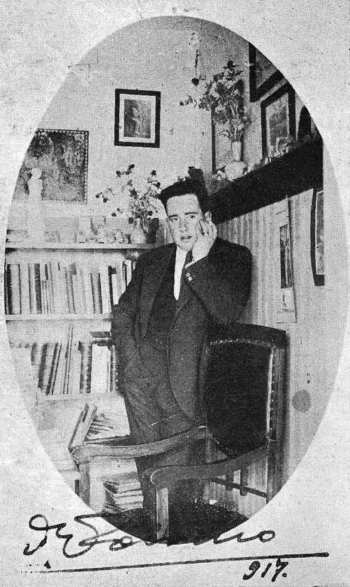 Ramón Sobrino Buhigas, fotografía en Vida Gallega 1923